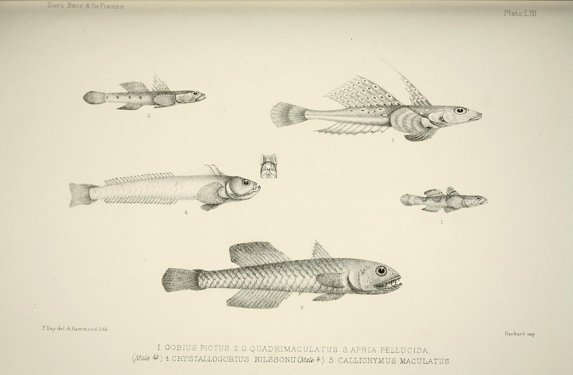 CO P H . 3 Q P 1 — ' O O .cl P ^ P -q CO W P P § .